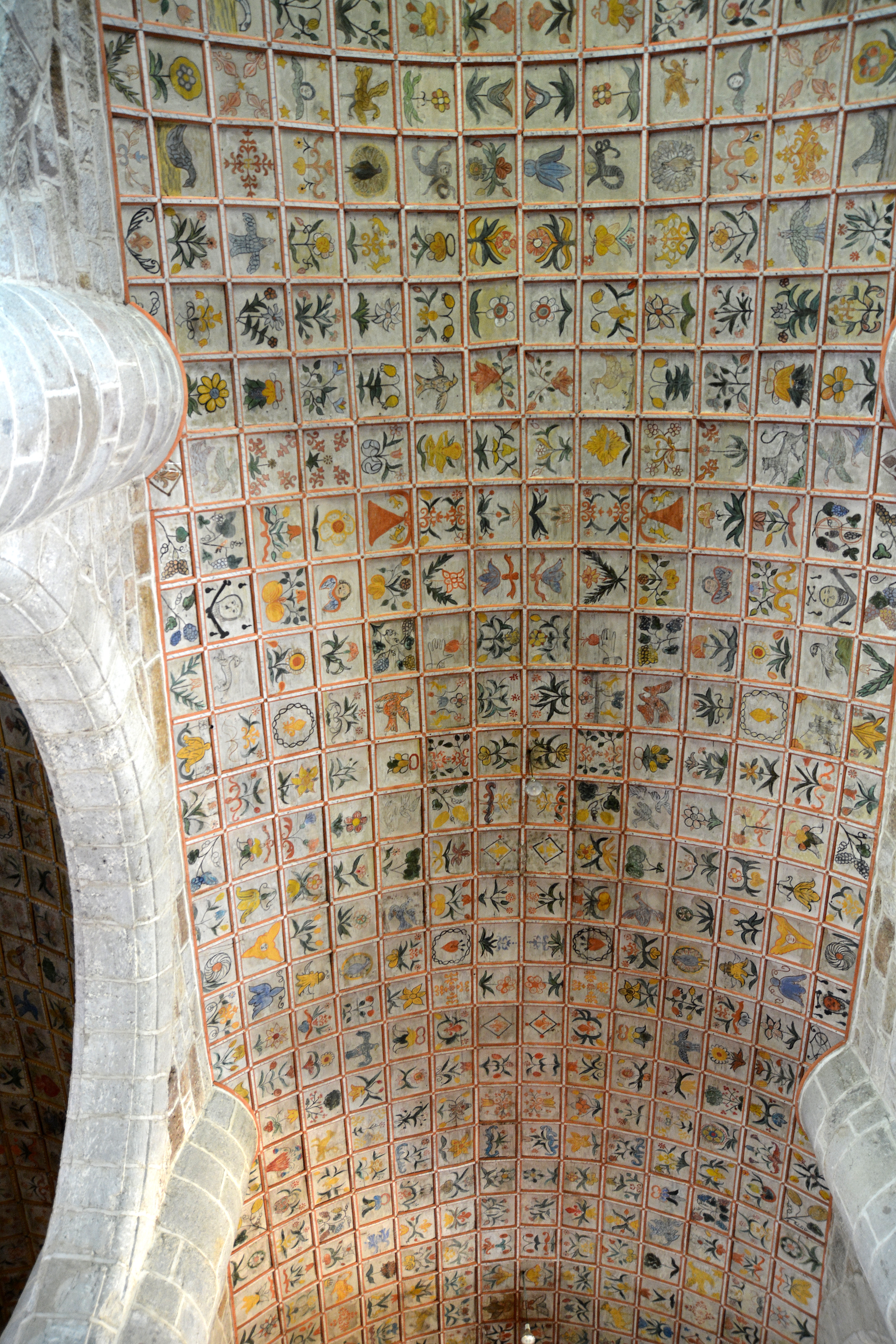 Plafond Église Saint-Léger de Cheylade, Cantal, Auvergne, France